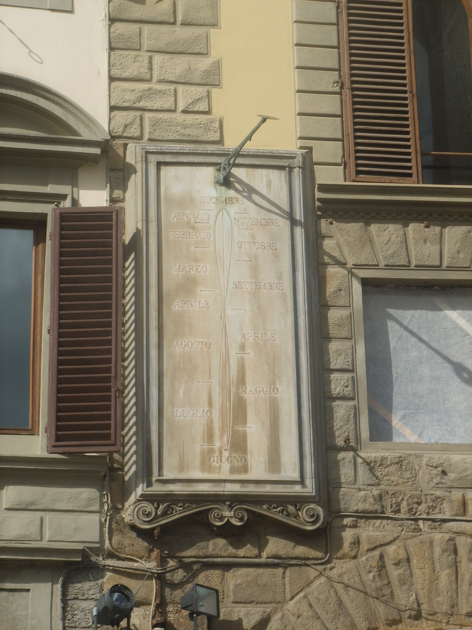 Piazza della Signoria, meridiana in Florence, italy